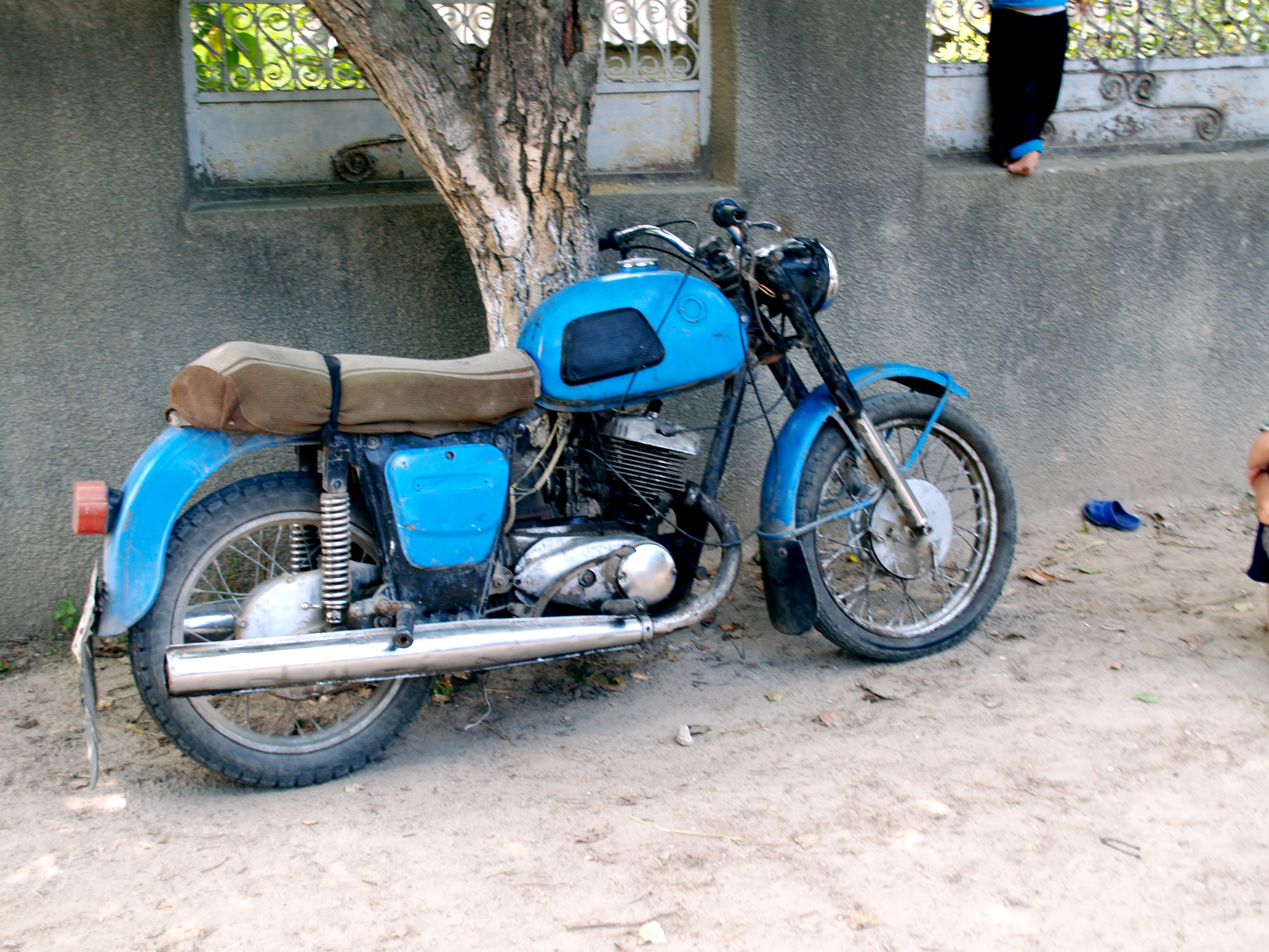 Orhei Vechi, Moldova. IZh Planeta-3-01(?)